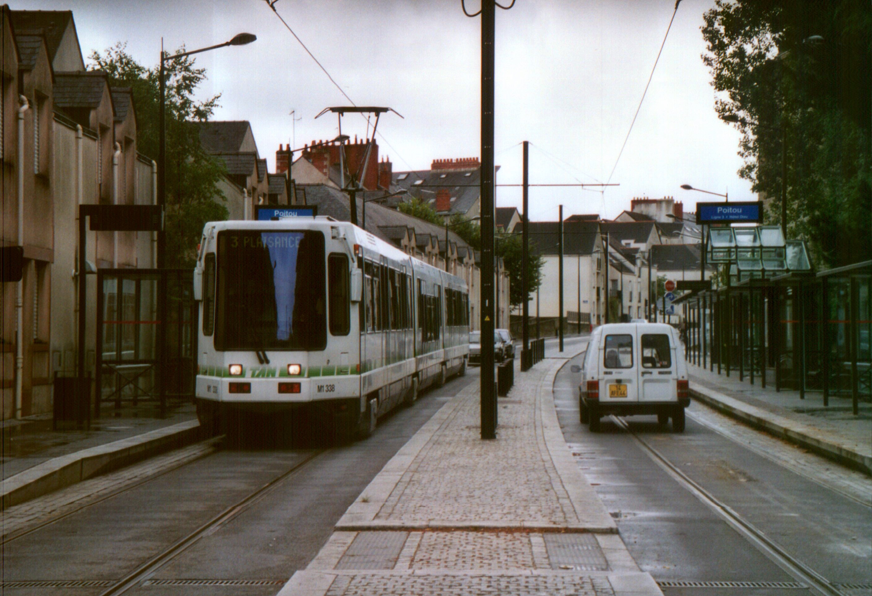 Tramway de Nantes : La station Poitou, établie dans une étroite, dispose d'une voie mixte partagée par les voitures et le tramway.